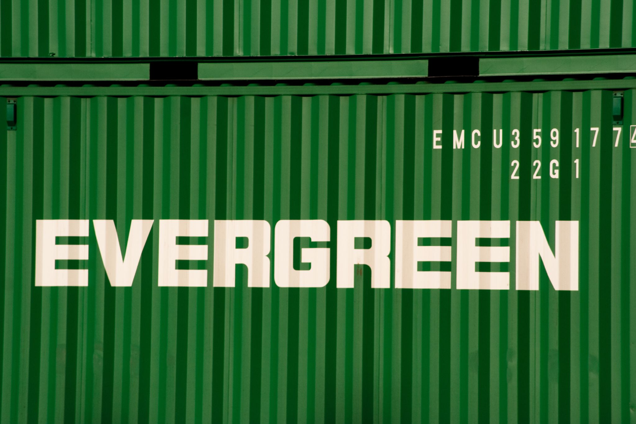 Evergreen shipping